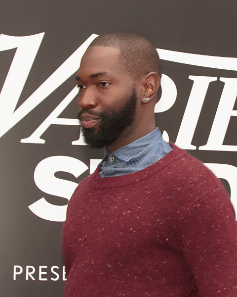 Toronto International Film Festival 2016